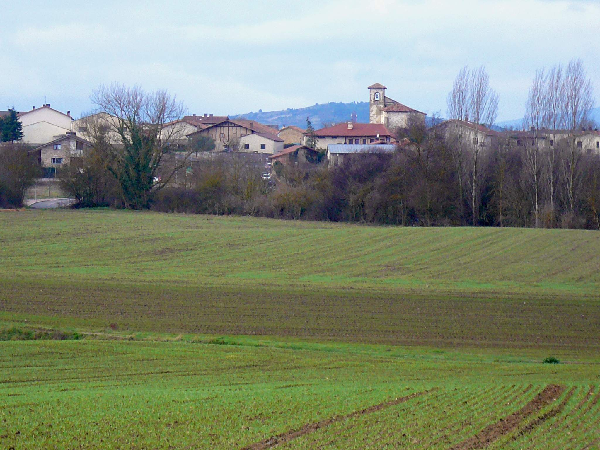 Zuazo de Vitoria (Álava)